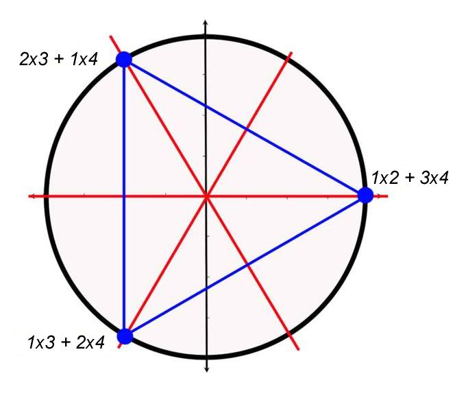 Action du groupe symétrique S4 sur un triangle